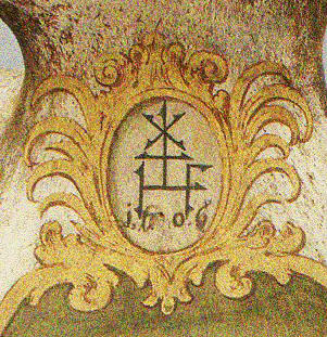 Kaufmannszeichen o. ä.